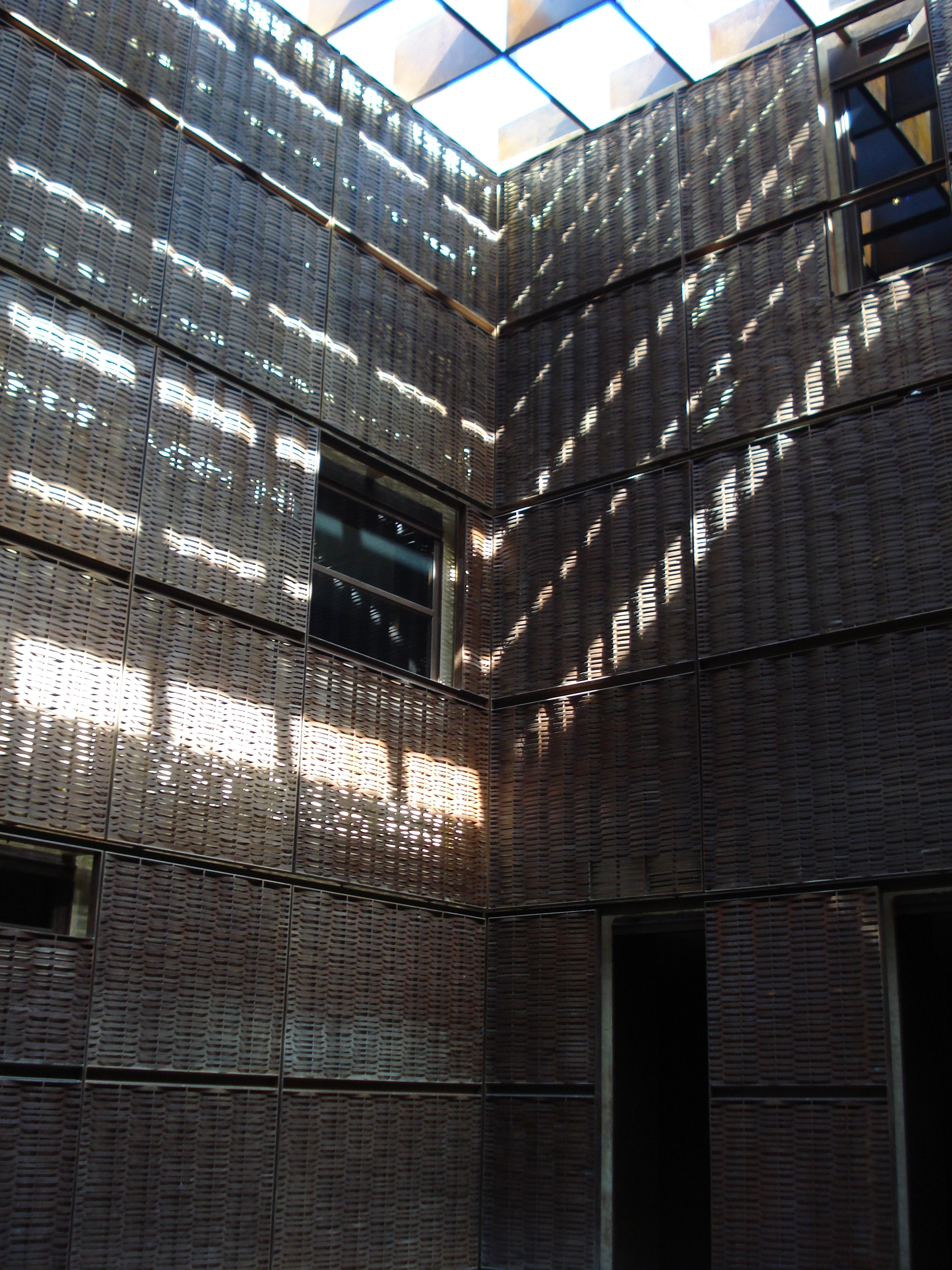 Patio interior del Museo Etnográfico de León